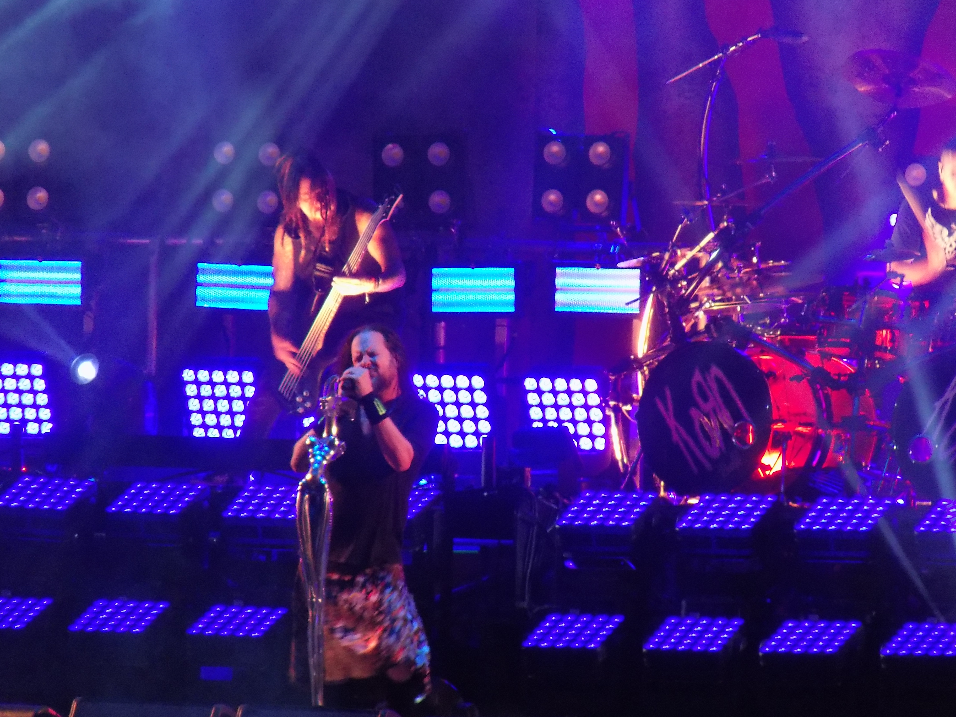 Korn à l'édition 2017 du Cabaret Vert à Charleville-Mézières le 25 août 2017.